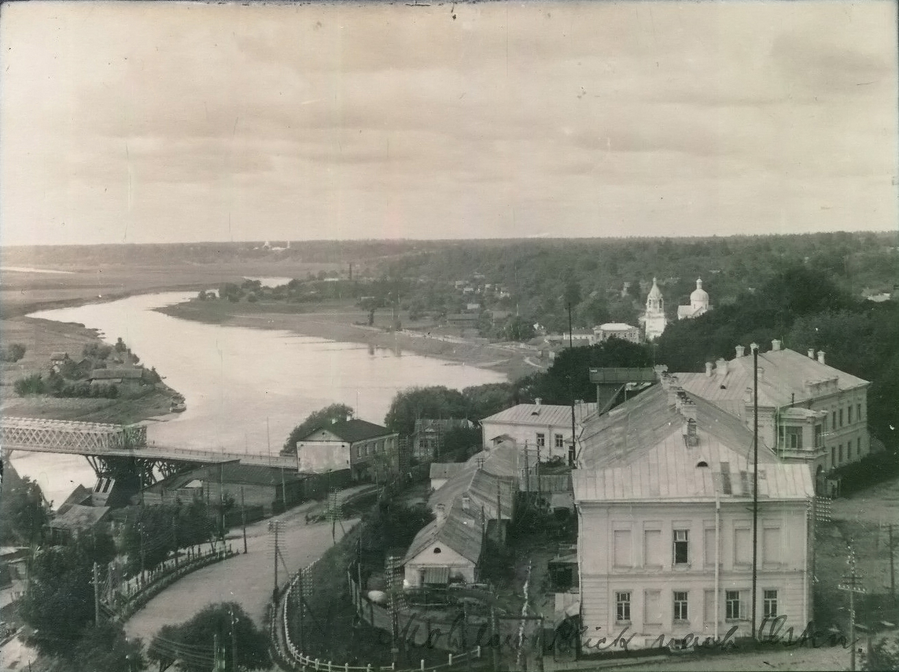 Беларуская (тарашкевіца): Магілёў (Mahiloŭ), Дняпро (Dniapro) пры ўтоку ракі Дубравенкі (Dubravienka)